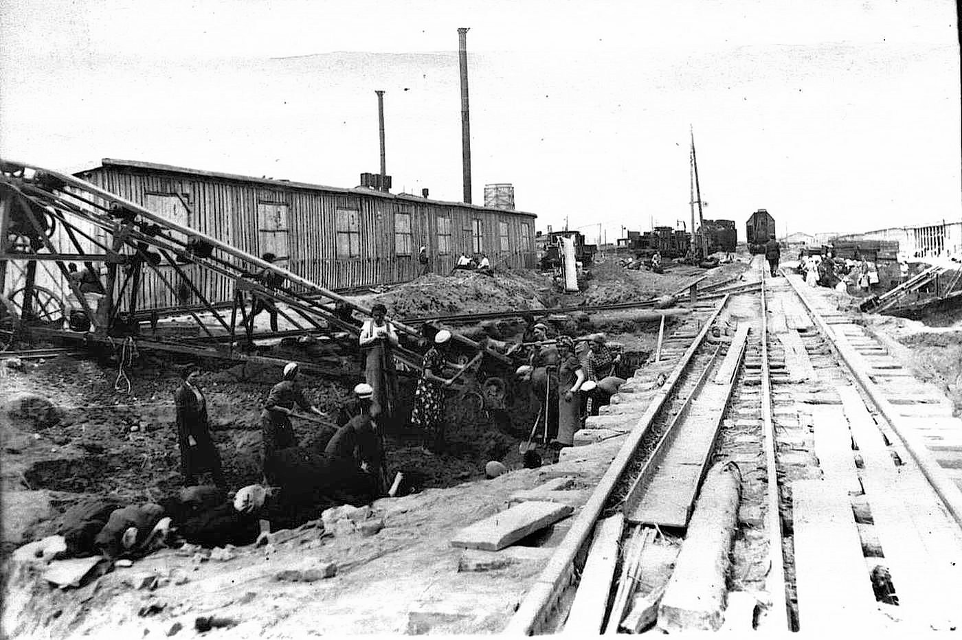 10-топливный-склад-подача-угля-на-транспортер-май-1942г.